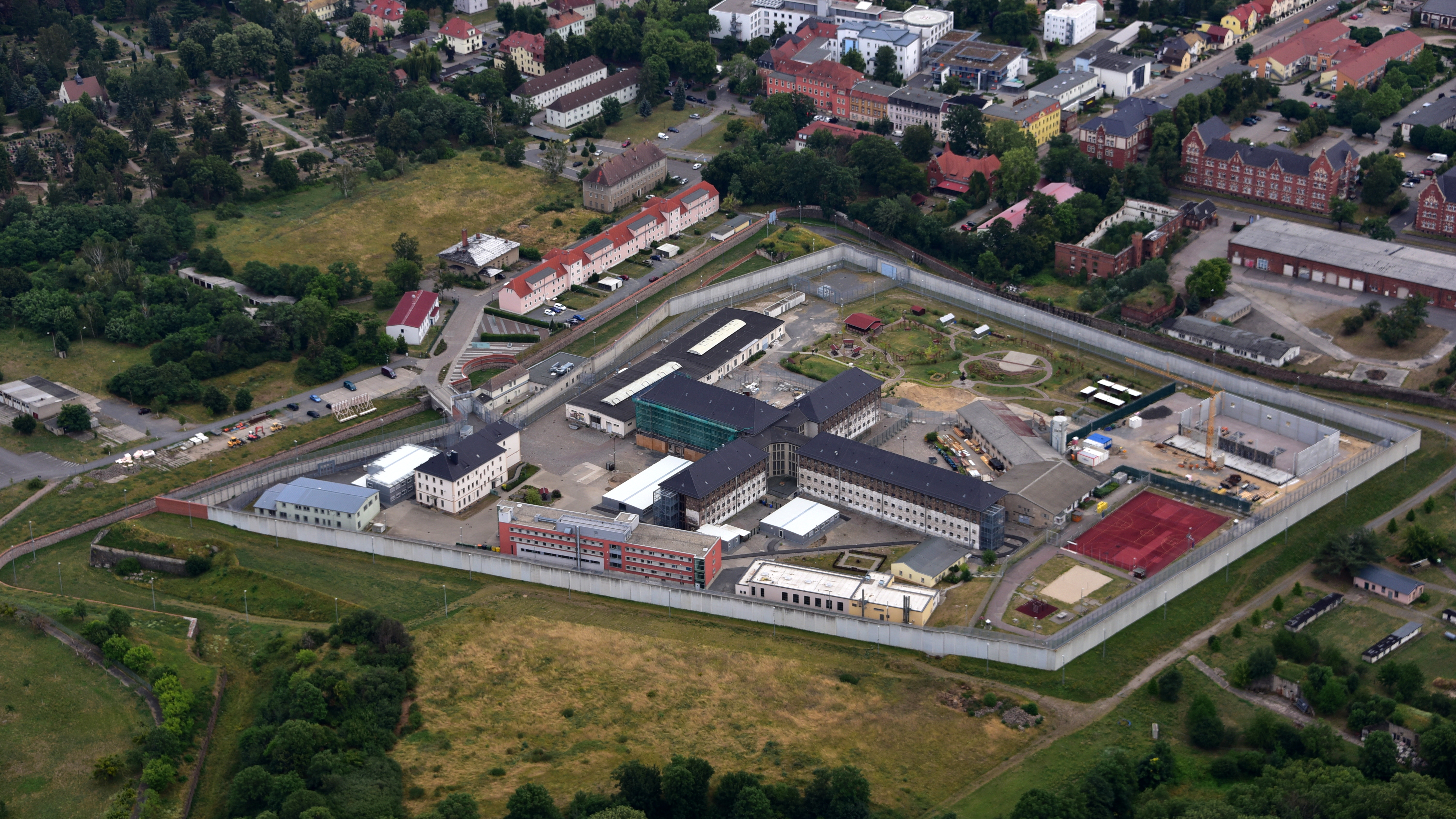 Torgau, JVA, Gefängnis, Luftaufnahme (2019)